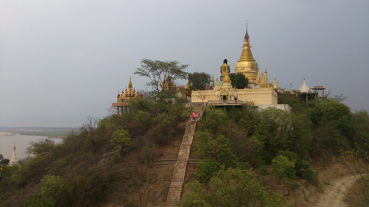 မြန်မာဘာသာ: စစ်ကိုင်း ရှင်ပင်နံကိုင်းစေတီတော်၊ ပဋ္ဌာန်းတရားတော်မြတ်ကို နှစ်ဆန်းတစ်ရက်နေ့တွင် ဤနေရာ၌ စတင်ရွတ်သည်။